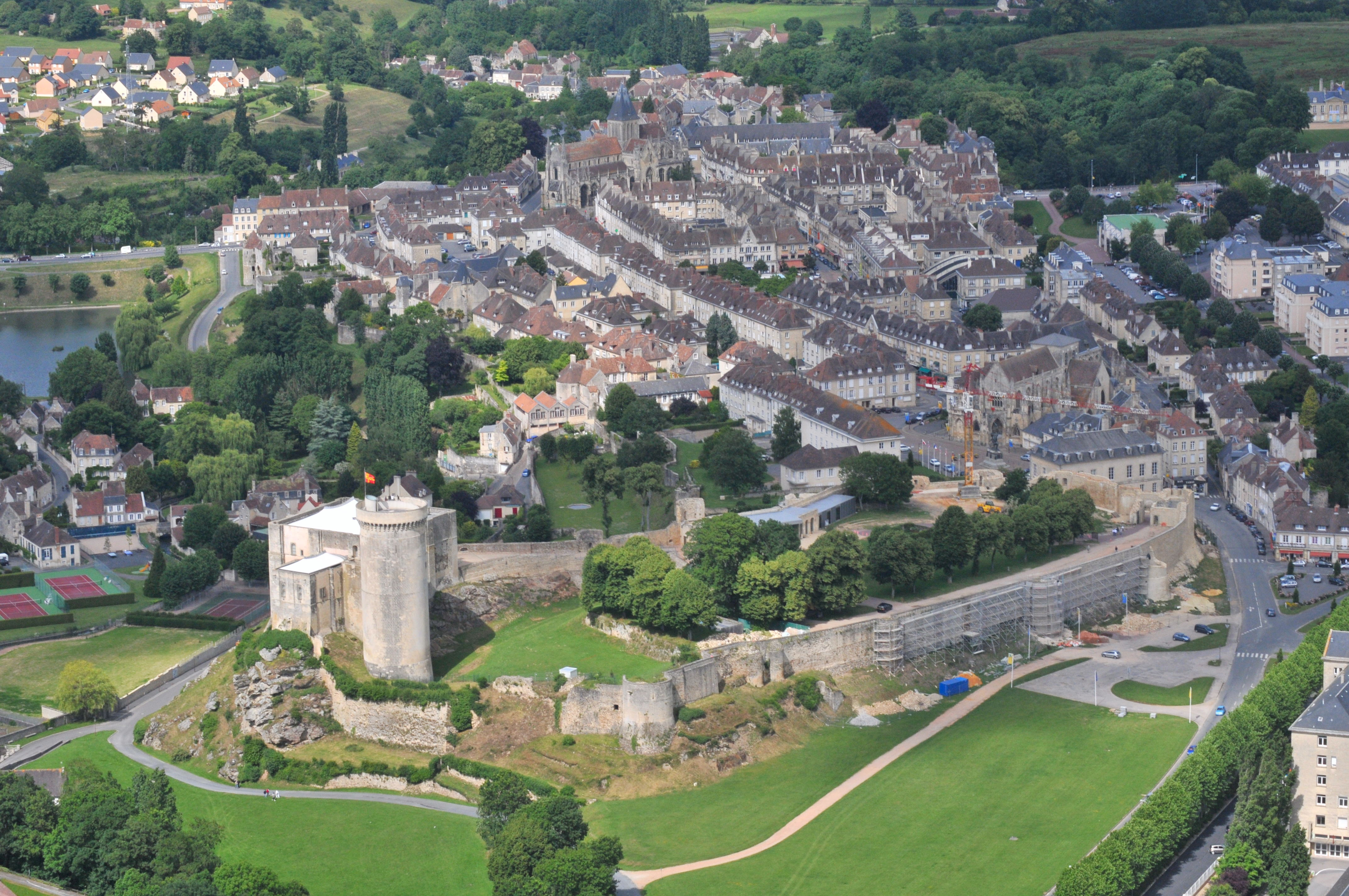 Le château de Falaise et le centre-ville.